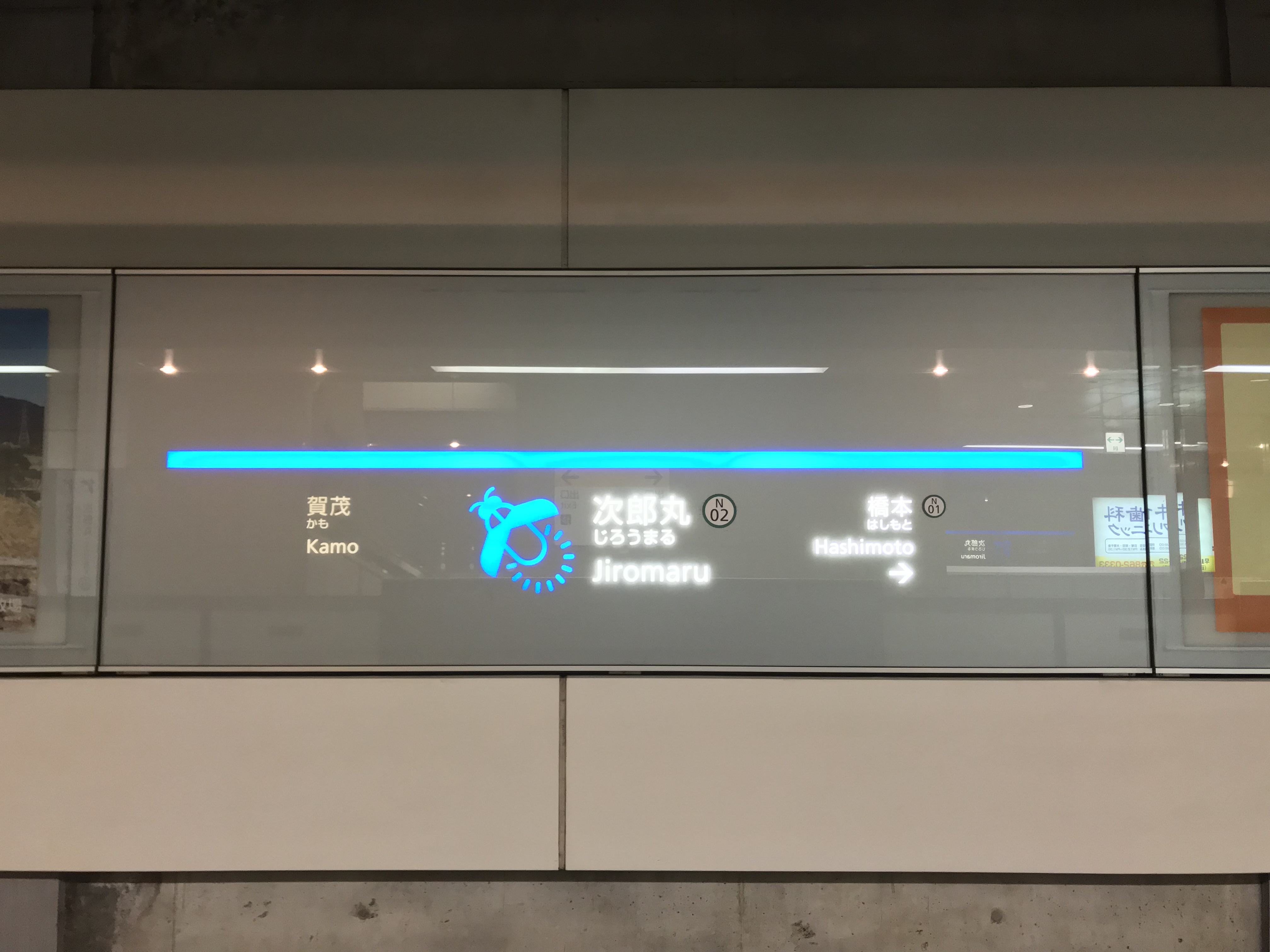 次郎丸駅の駅名標。イラストはホタル